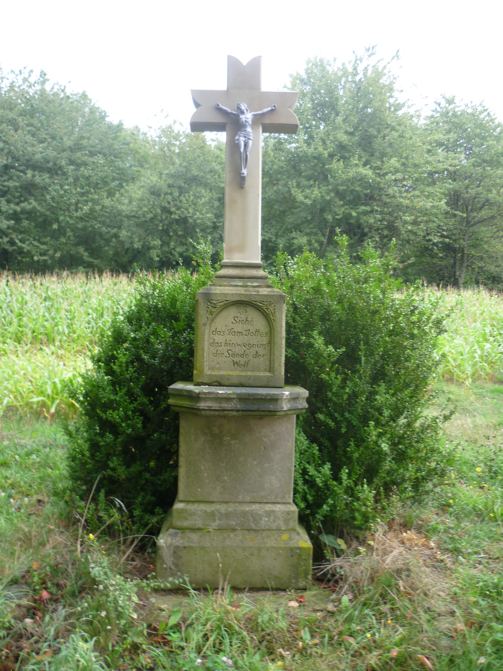 Reitscheider Kreuz, Flurkreuz